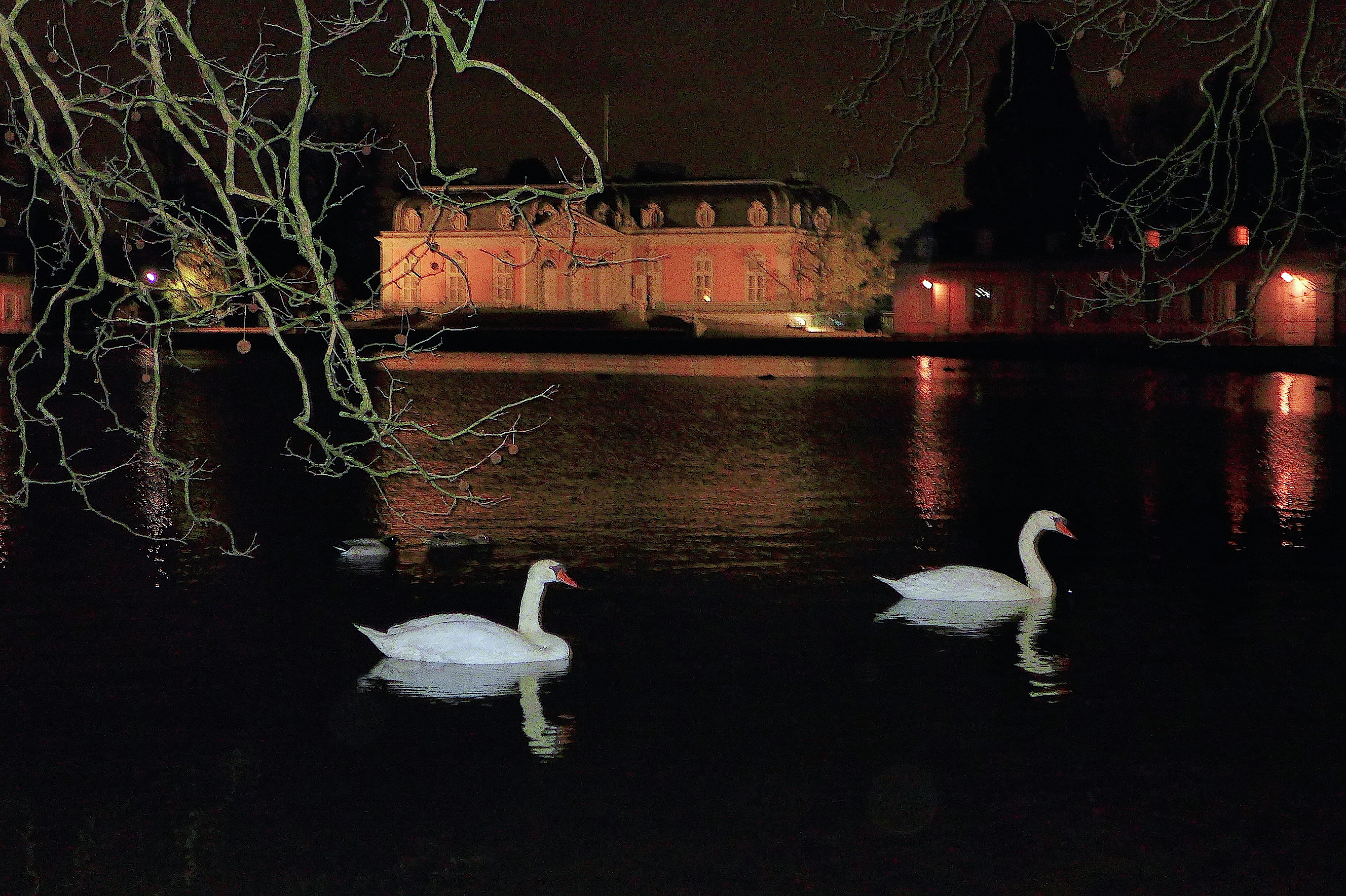 Дворец Бенрат в вечерней тишине. 11 марта 2019.